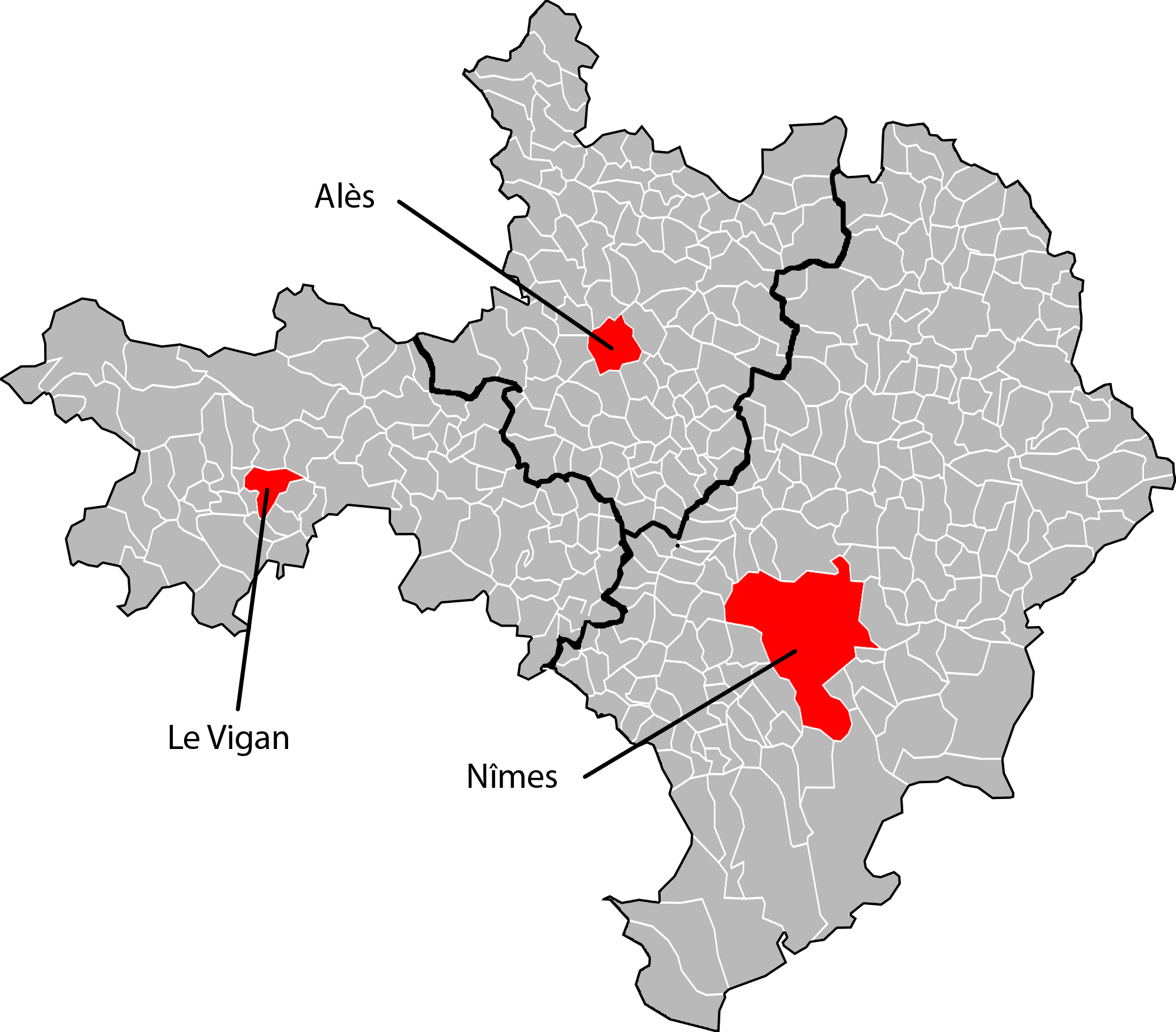 Carte des arrondissements du Gard